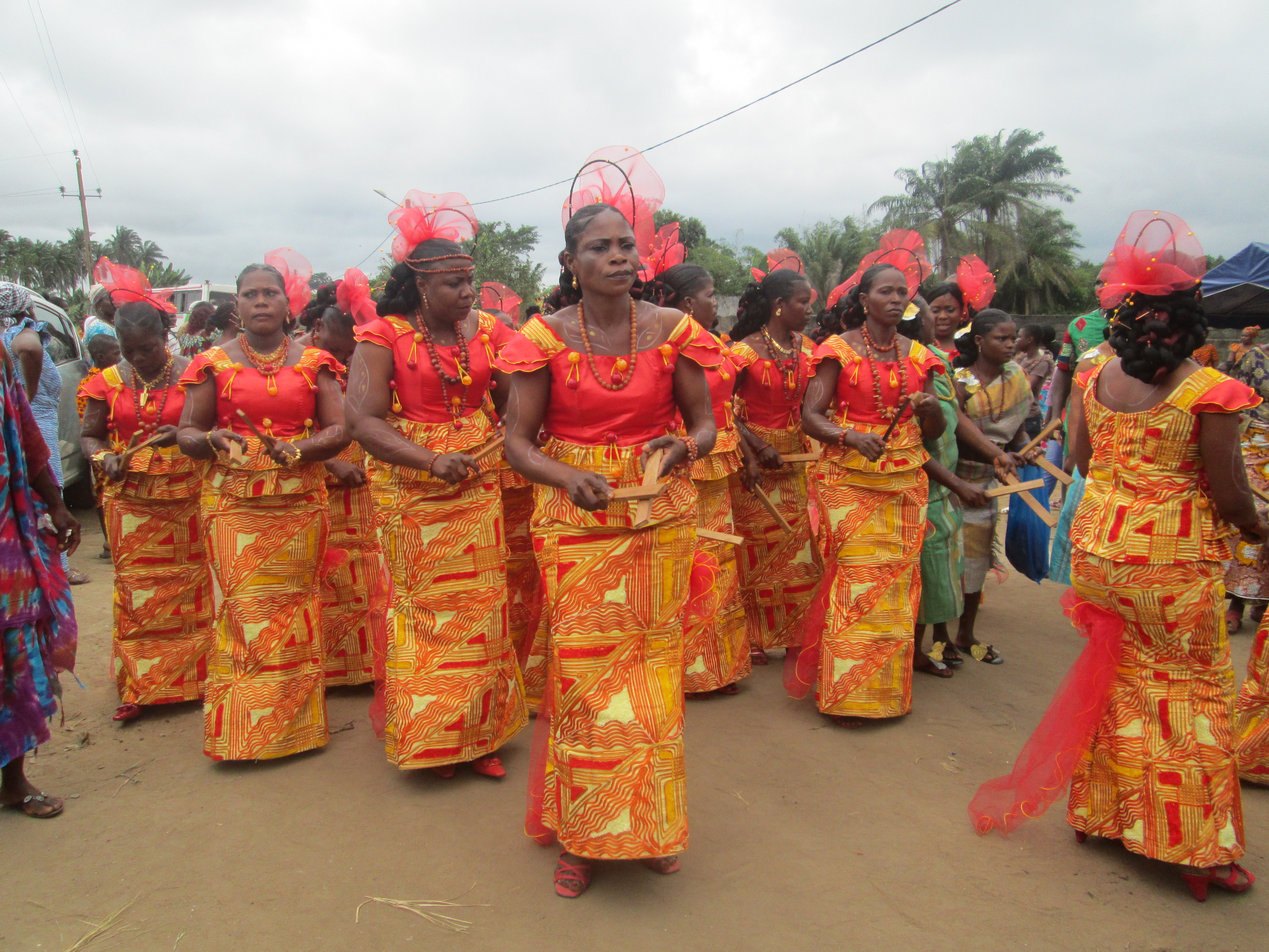 Tenue en pagne kita pour la sortie officielle d'une génération chez les Ebrié This is an image of Cultural Fashion or Adornment from Côte d'Ivoire